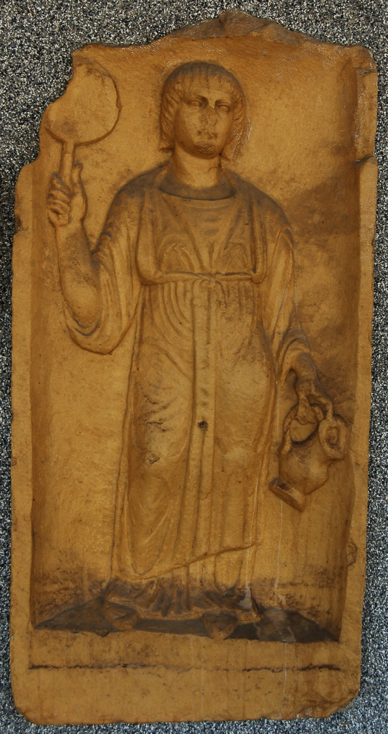 Nachbildung des in Aguntum gefundenen Reliefsteins "Norisches Mädchen", Original in Schloß Bruck